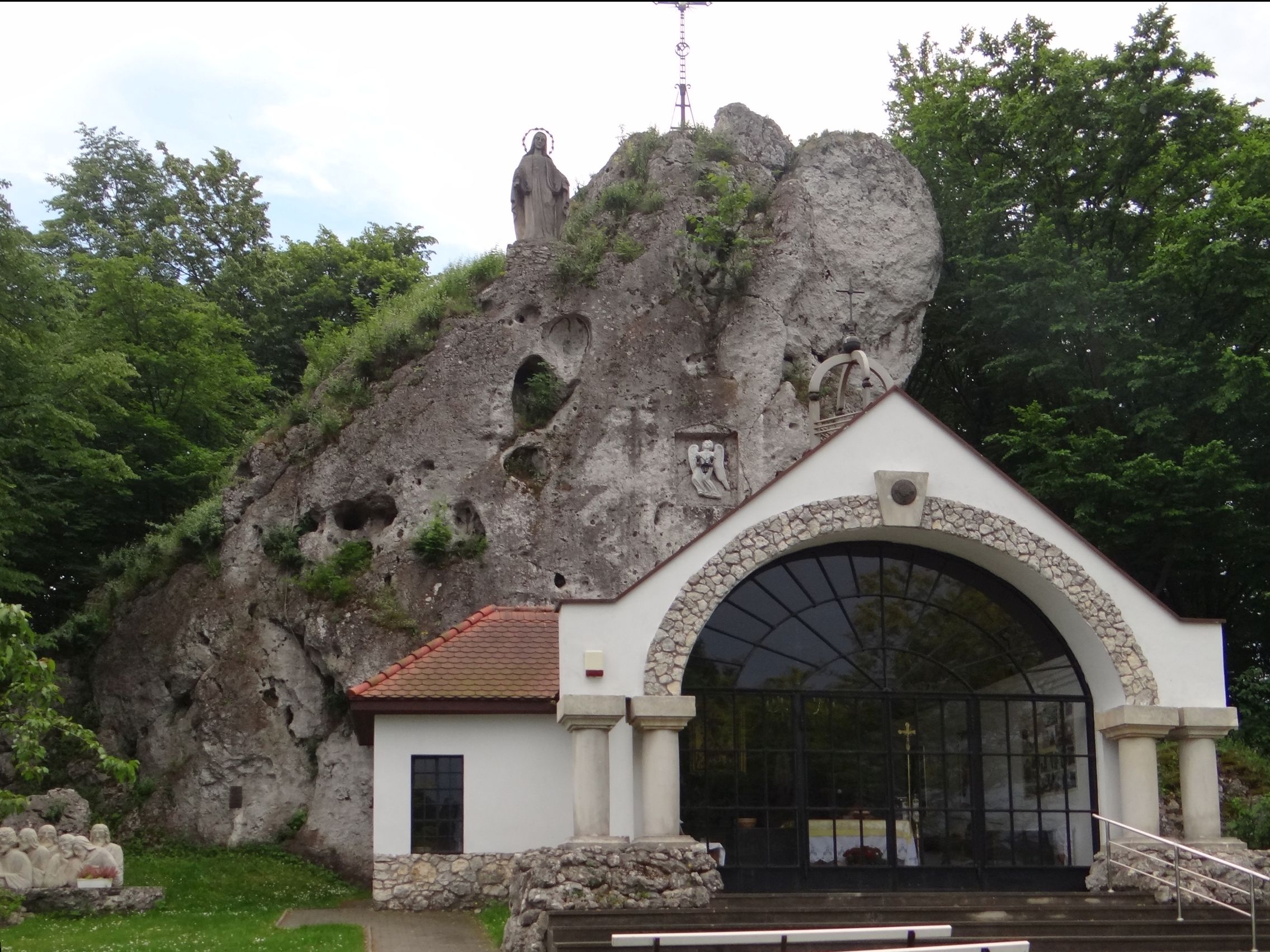 Sanktuarium Matki Boskiej Skałkowej w Podzamczu